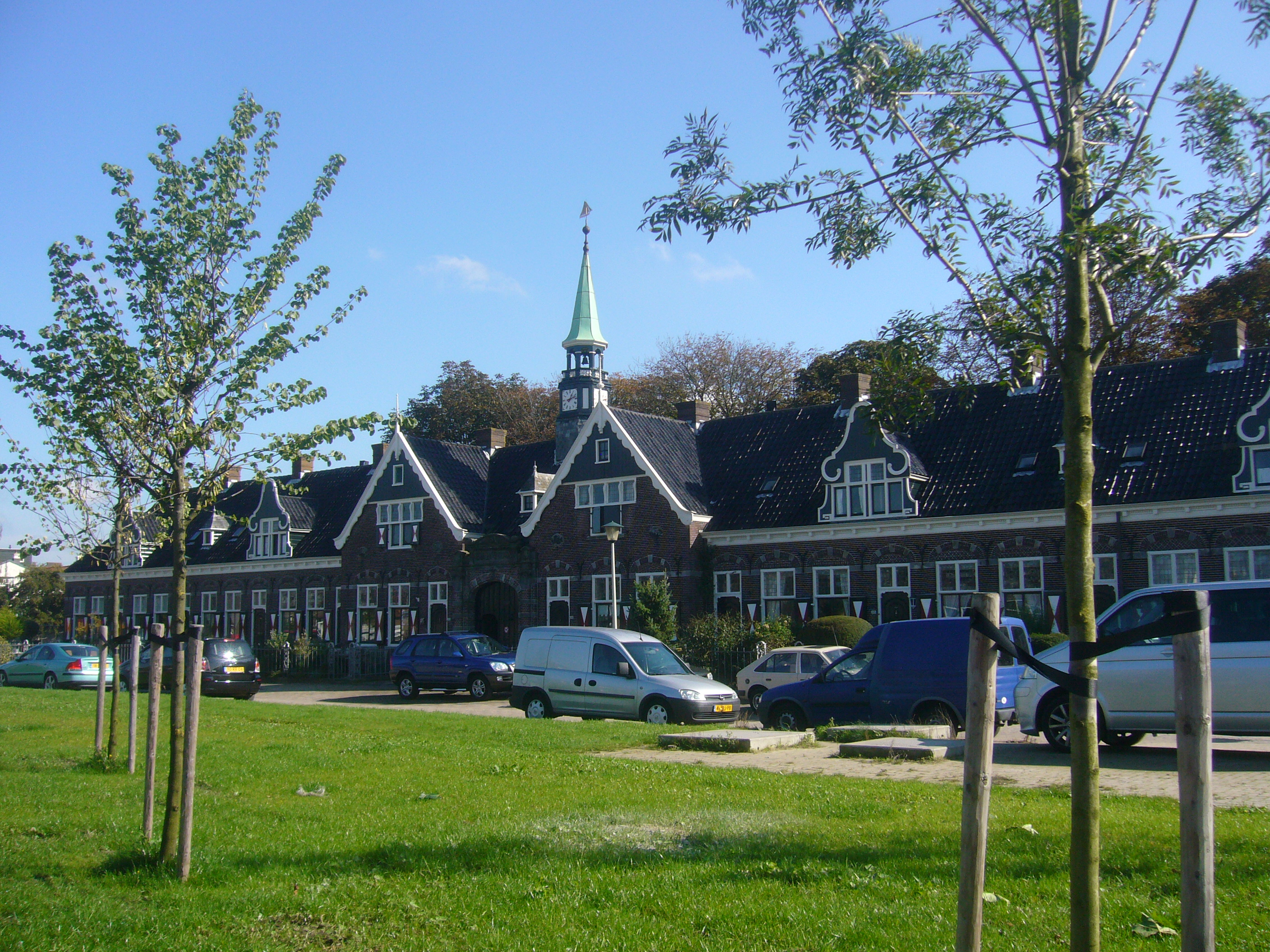 't Hof Saenden Billitonkade 31-40 Wormerveer gebouwd in 1915